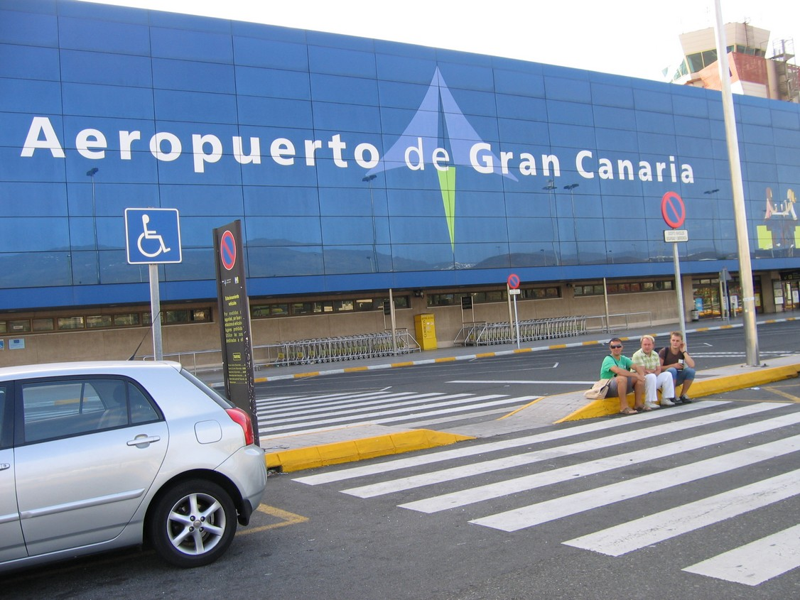 Gran Canaria Airport, Terminal A